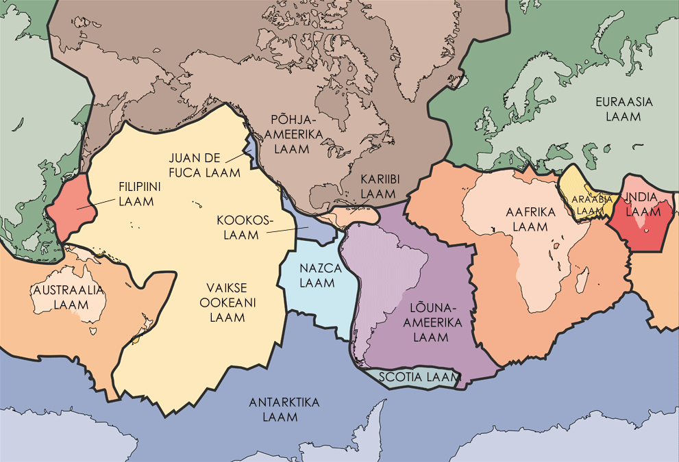 Laamade kaart